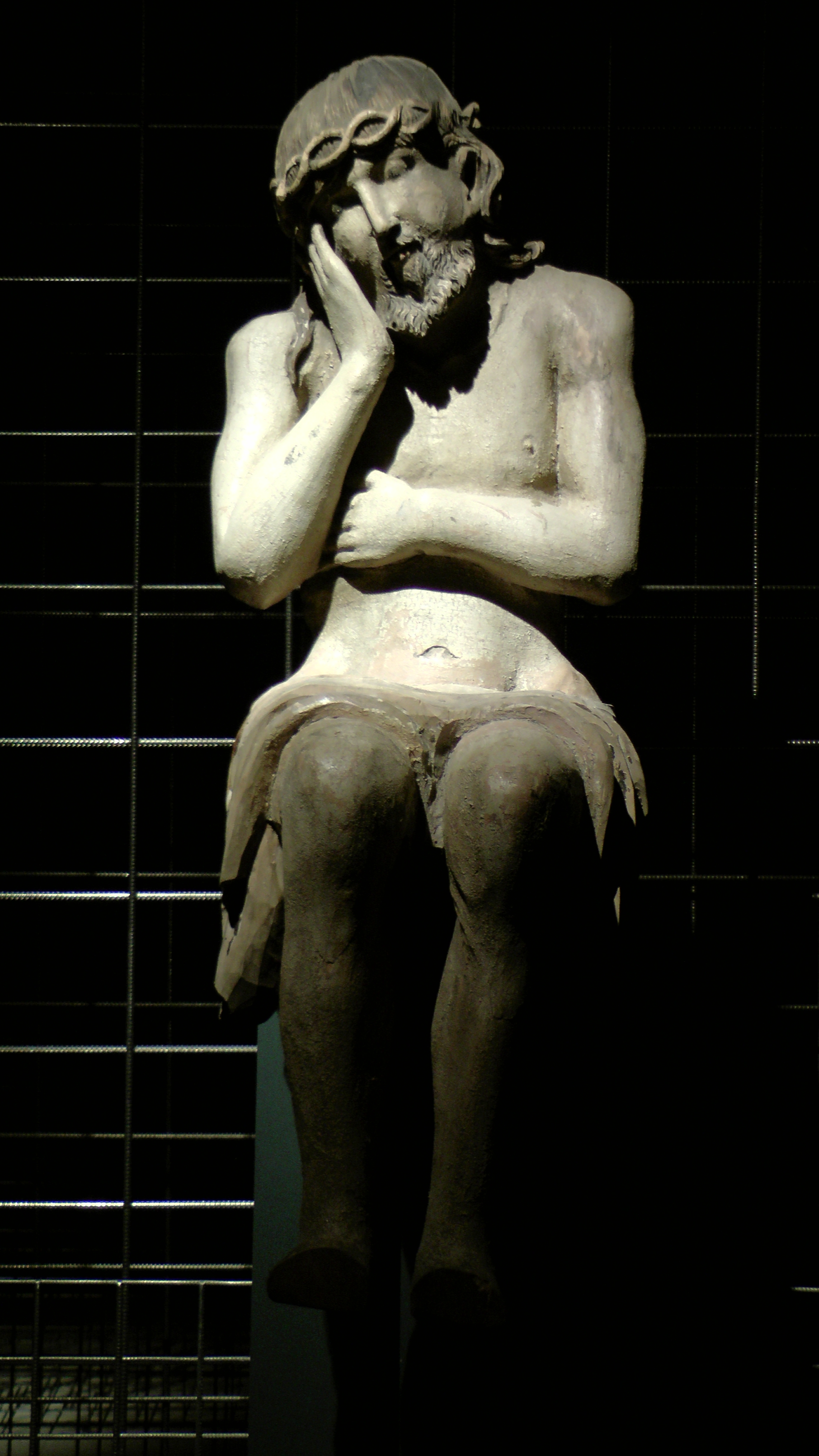 Спас Полунощный, XIX век. Тверская областная картинная галерея. Дерево, резьба, роспись. Фотография сделана на выставке "Христос в темнице" в Санкт-Петербурге